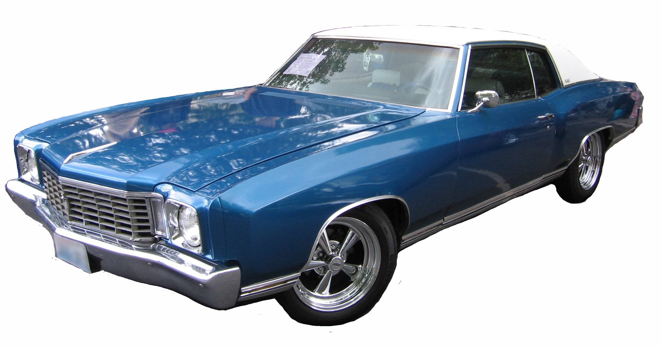 1972 Chevrolet Monte Carlo